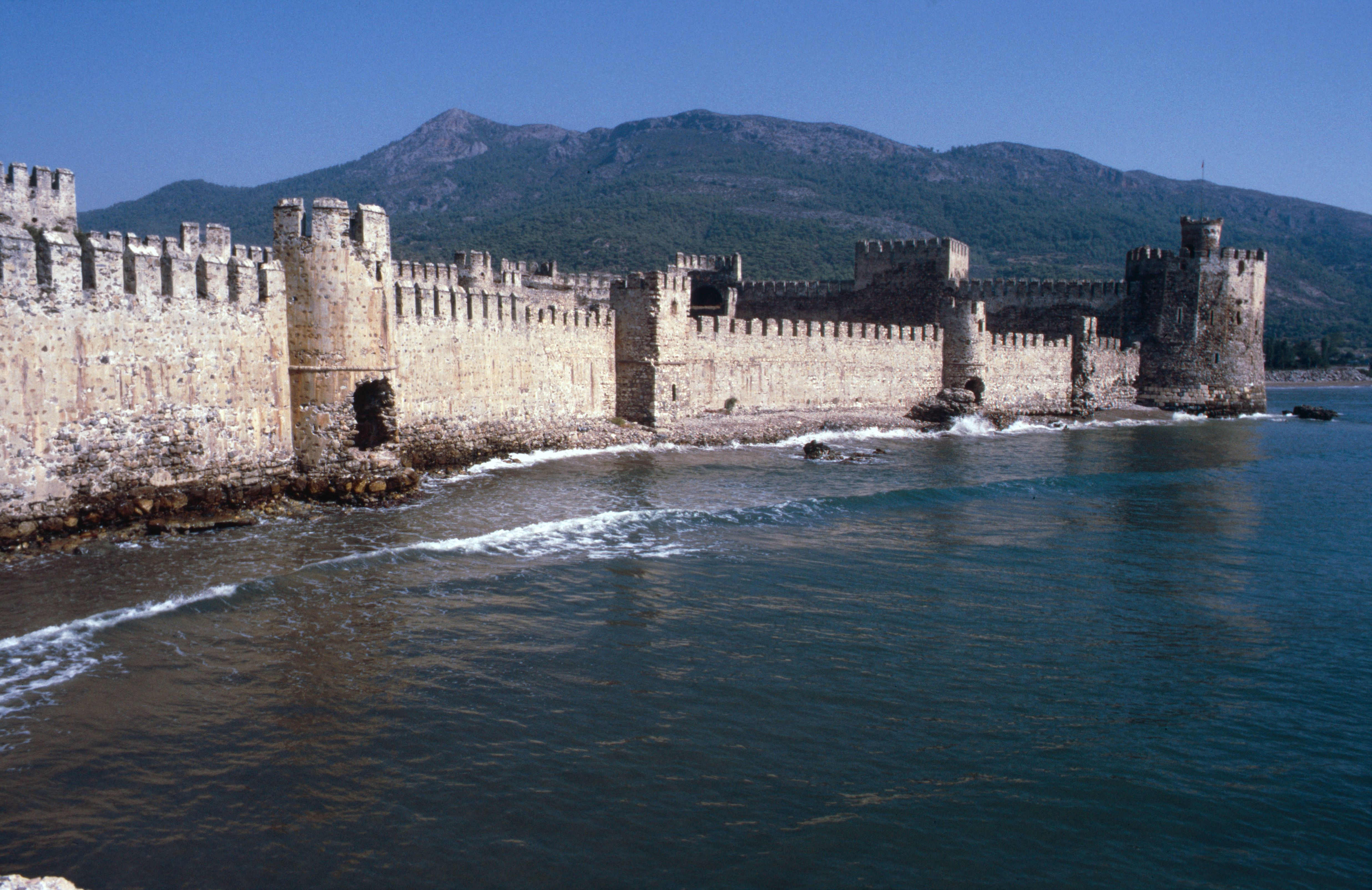 Außenmauer von Mamure Kalesi 1988